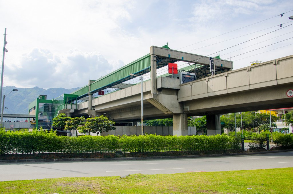 Estación Niquía Metro de Medellín